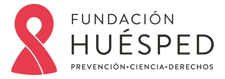 Logo Fundación Huésped